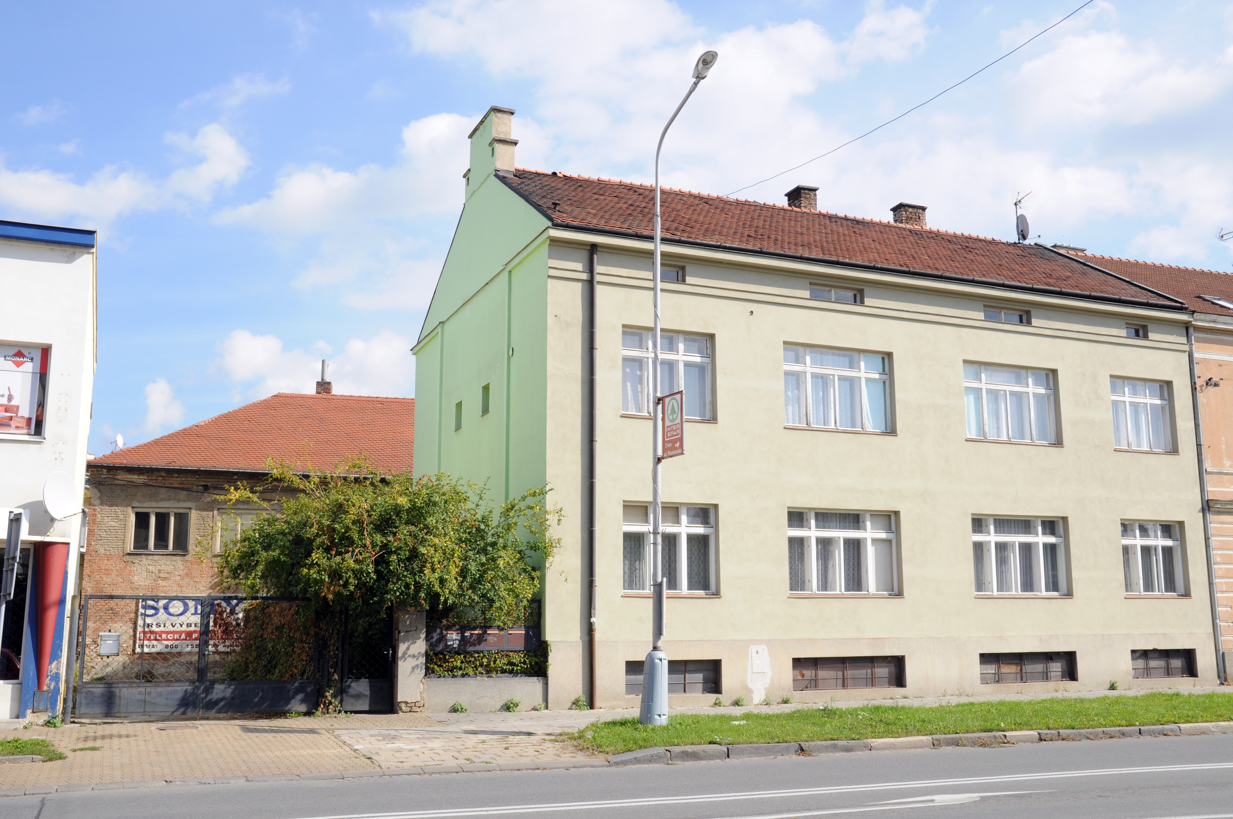 Bratrská škola (Prostějov), Kostelecká 245/2, Prostějov